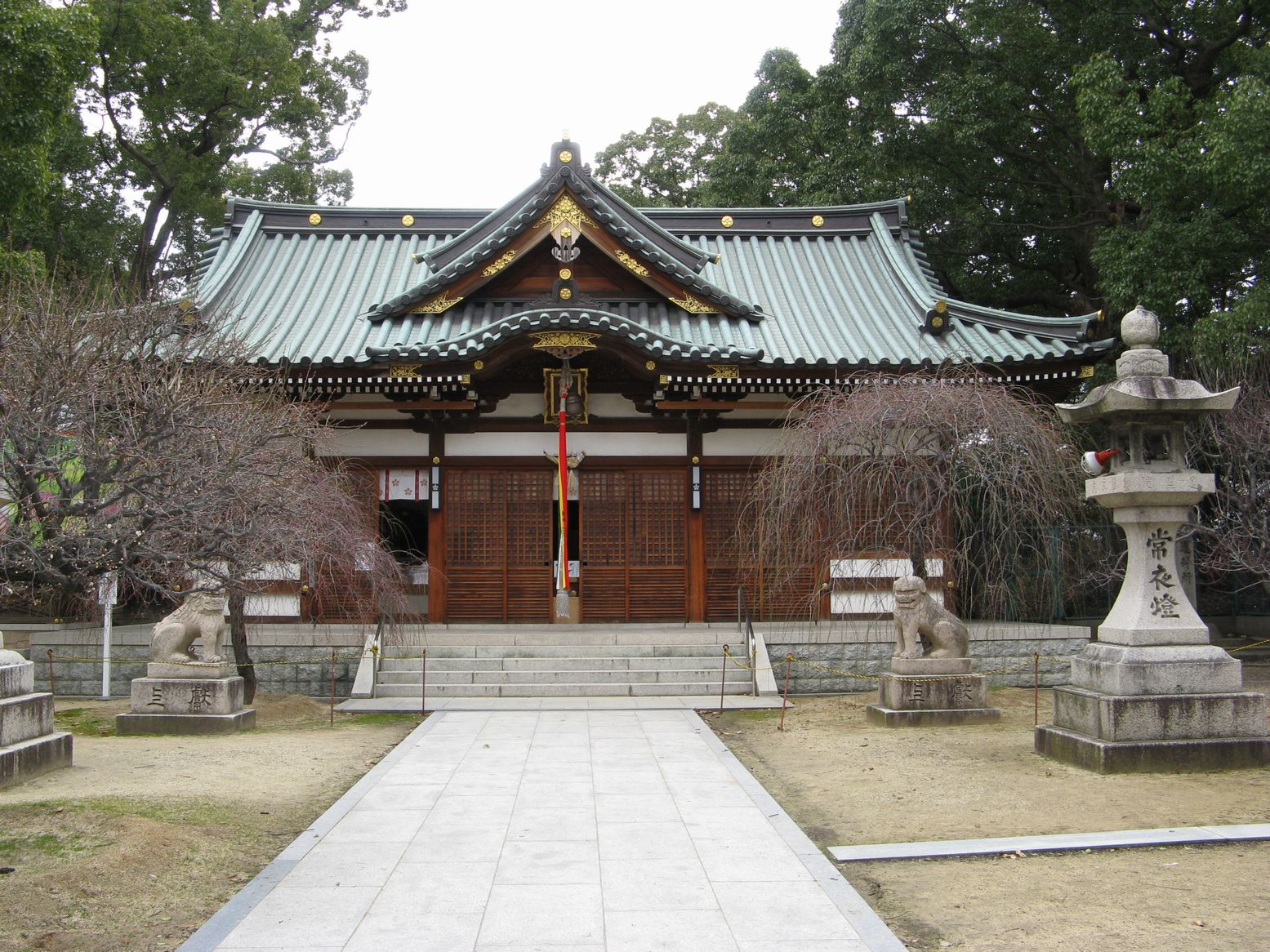 屯倉神社 拝殿 2008年2月8日 Bakkai撮影